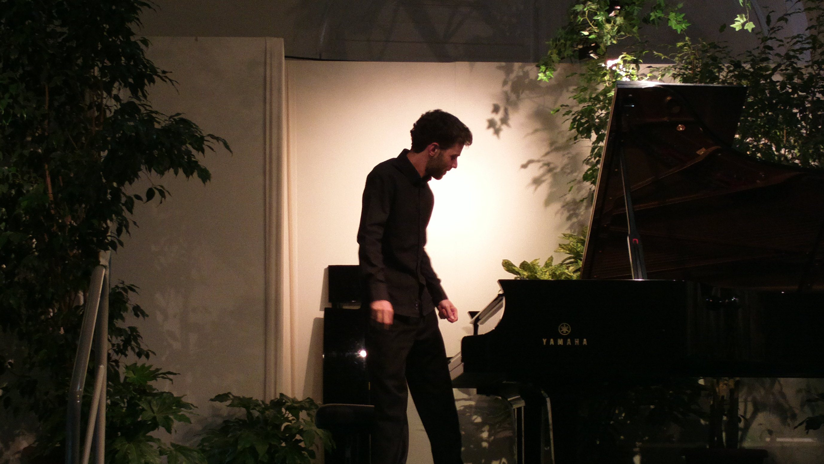 Adam Laloum en concert au Festival Solistes aux serres d'Auteuil à Bagatelle à Paris, le vendredi 31 aout 2012